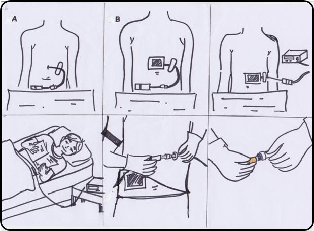 Langkah-langkah mengendalikan mesin dialisis peritoneal semasa rawatan